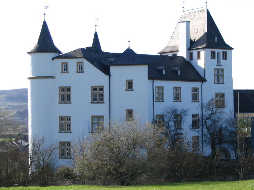 Schloss Berg Nennig Author: me Date: Mar. 2007